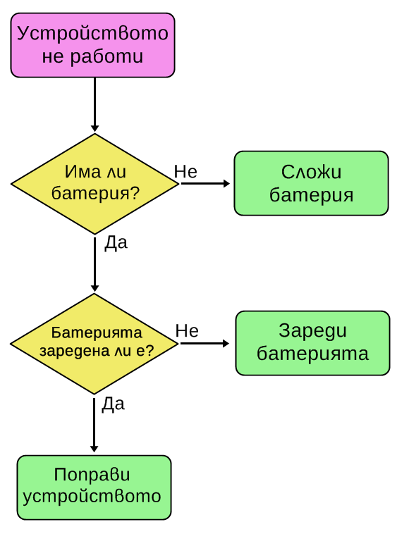 Проста блок-схема, показваща процеса по справянето с неработещо устройство